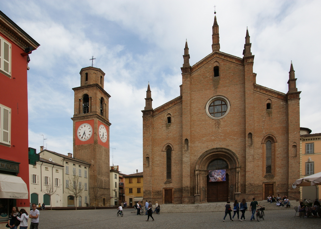 La Collegiata e il Campanile